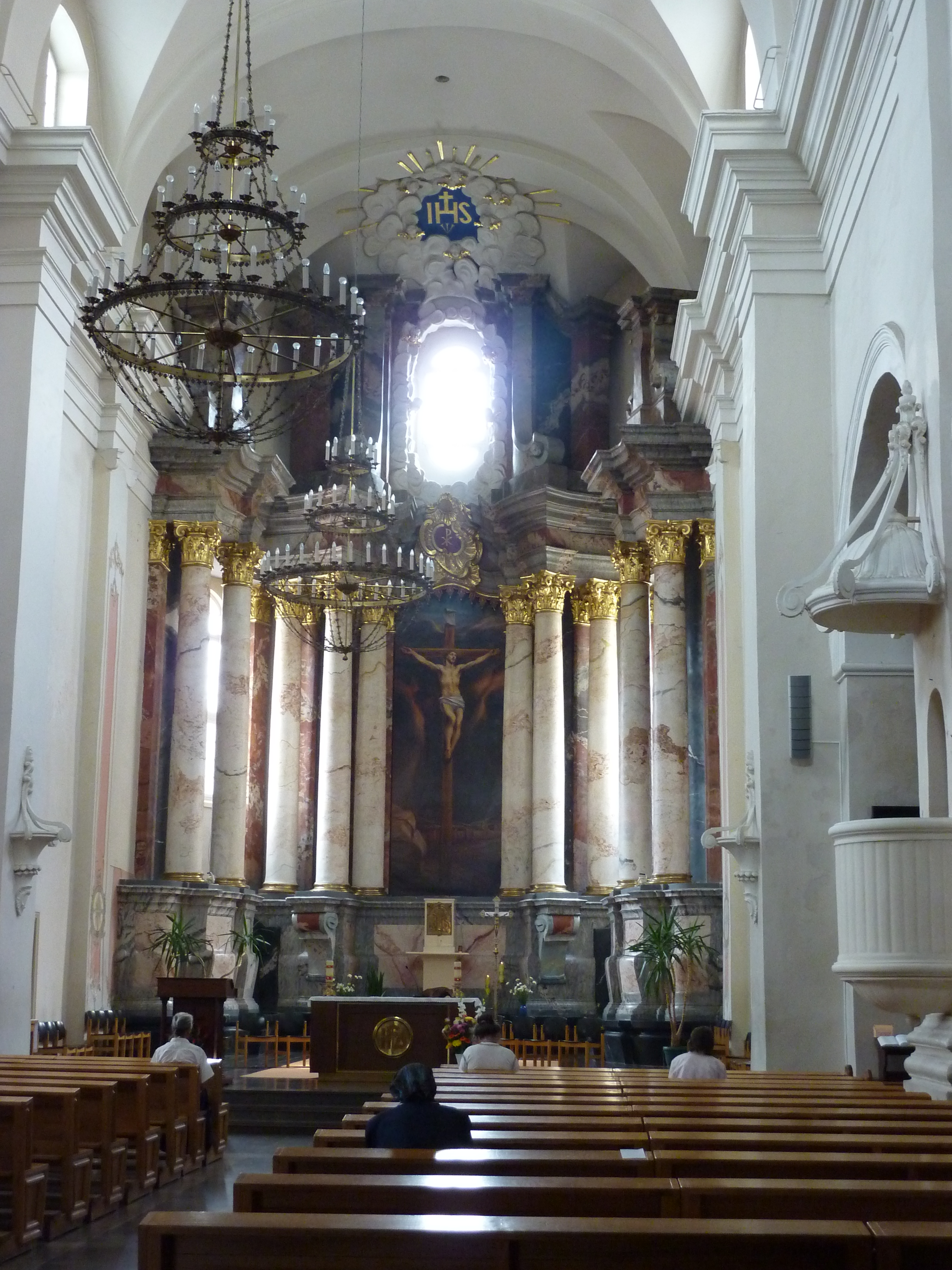 Kościół jezuitów pw. św. Franciszka Ksawerego w Kownie